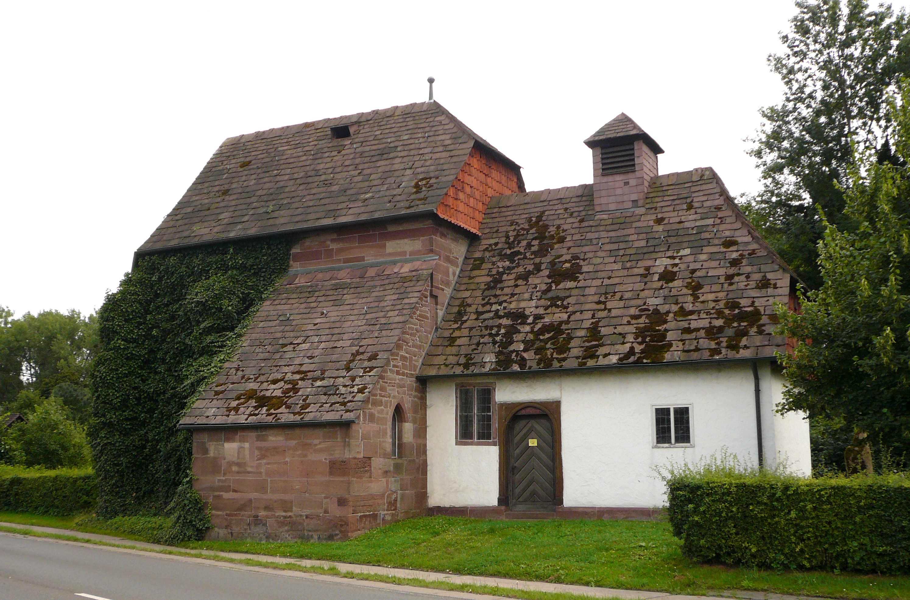 Kapelle St. Barholomäi oder Sertürner-Kapelle in Einbeck. Sandsteingebäude aus dem Anfang des 15. Jahrhunderts, verputzter Fachwerkanbau (im Bild rechts) von 1510. Vorne (Nordseite) Sandstein-Anbau mit Grabgewölbe, Grabstätte von Friedrich Wilhelm Sertürner.